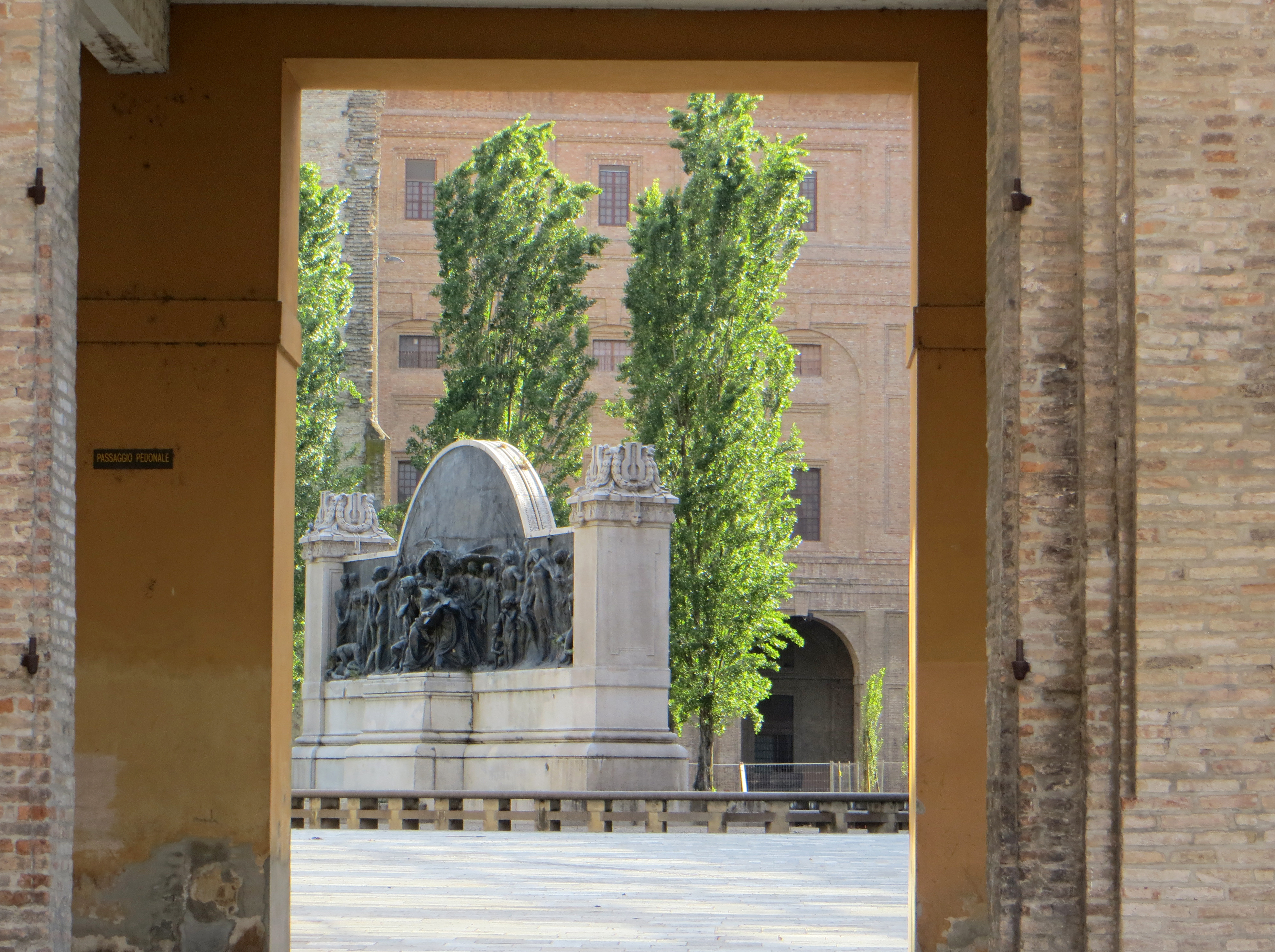 Monumento a Giuseppe Verdi (Parma) - scorcio attraverso il porticato su via Bodoni del palazzo della Pilotta